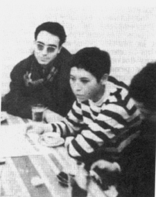 گیلکی: مصطفى خىاطي ؤ آليس بئکئرهؤ - ۱۹۶۶ ميلادي